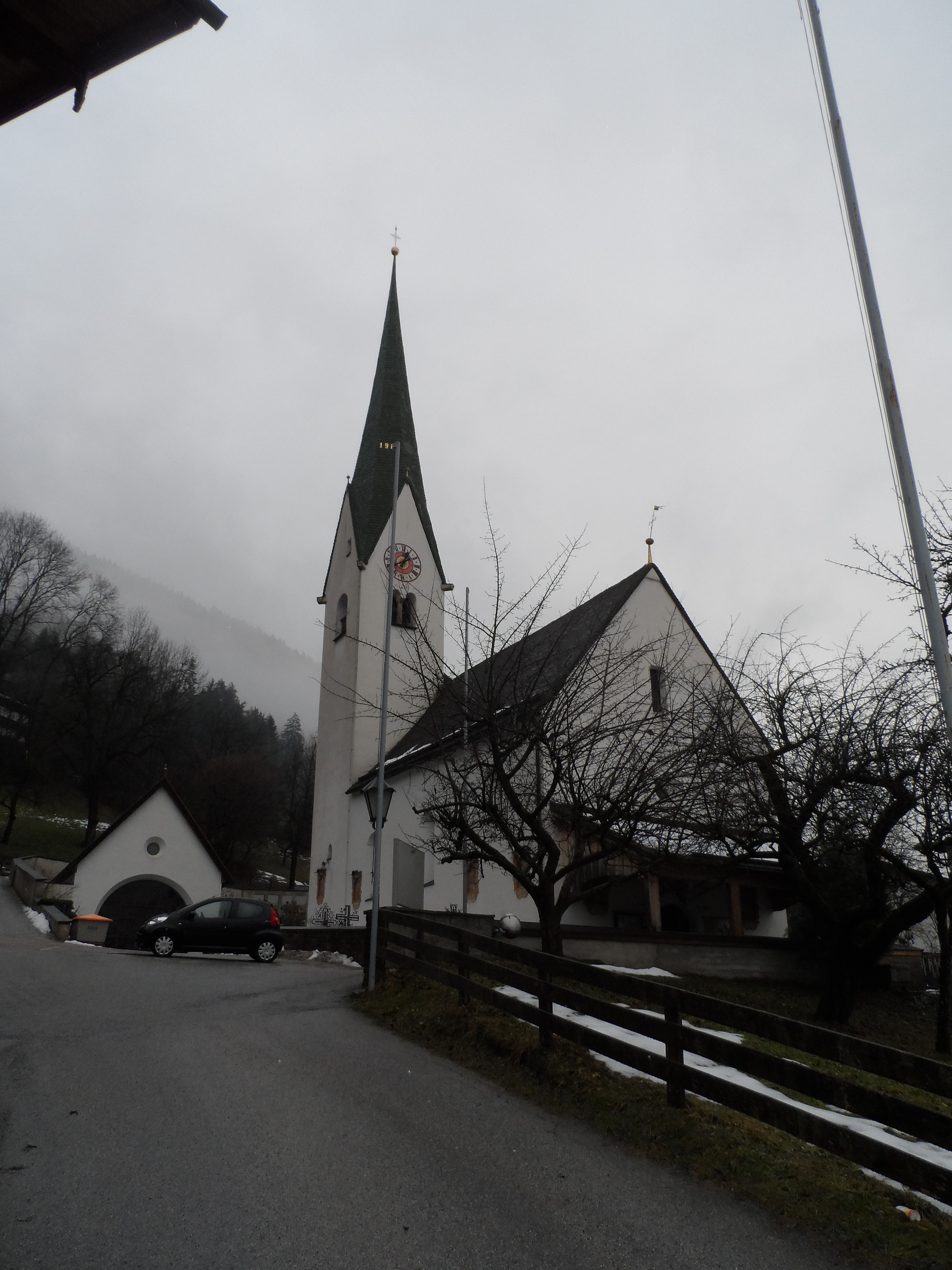 Kath. Pfarrkirche hl. Leonhard – Bruck am Ziller, Zillertal